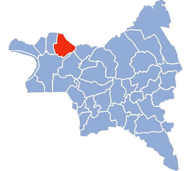 Auteur Hervé SUAUDEAU Licensing Catégorie:Cartes de Seine-saint-Denis Catégorie:Stains